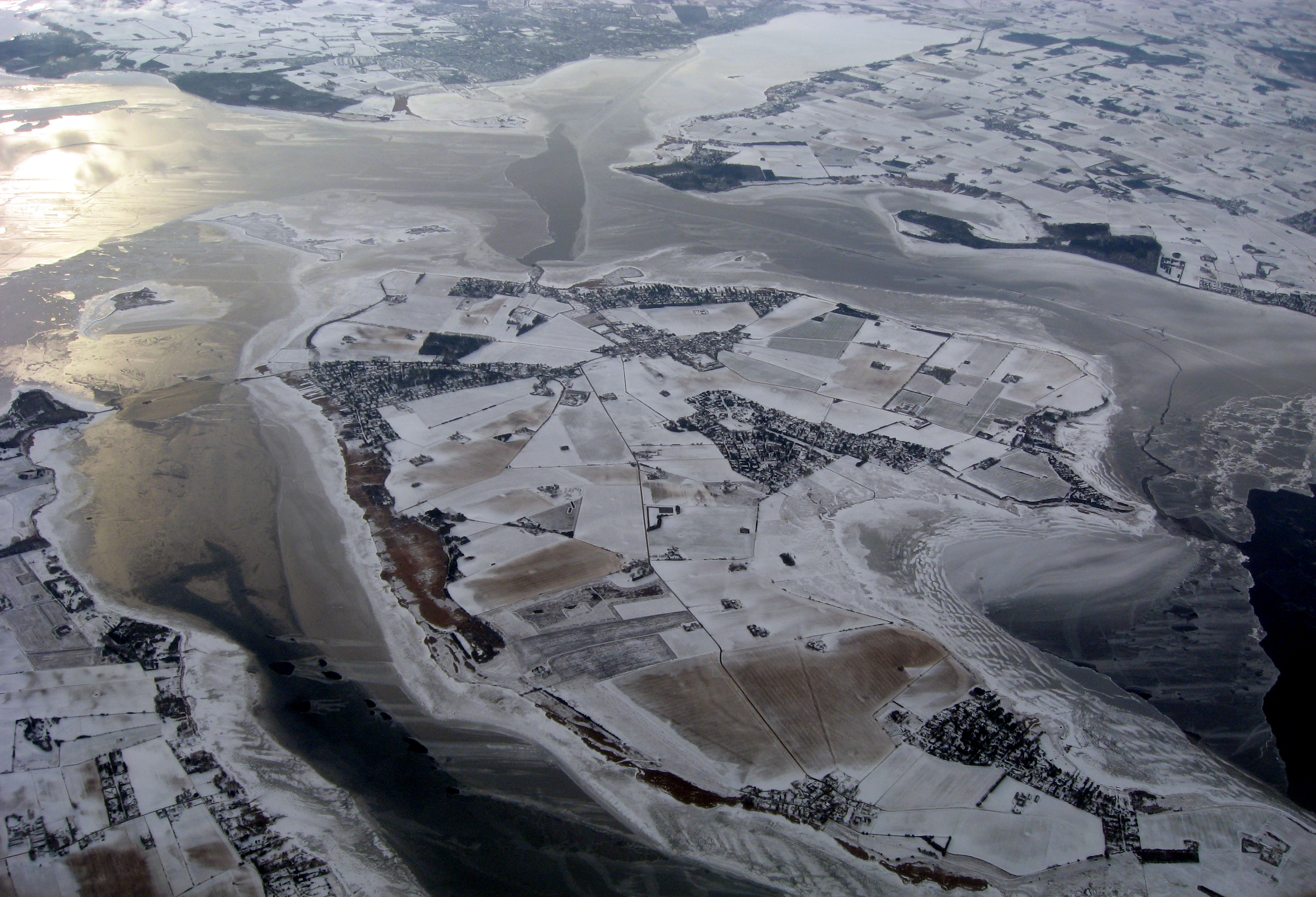 Orø / Inder Bredning